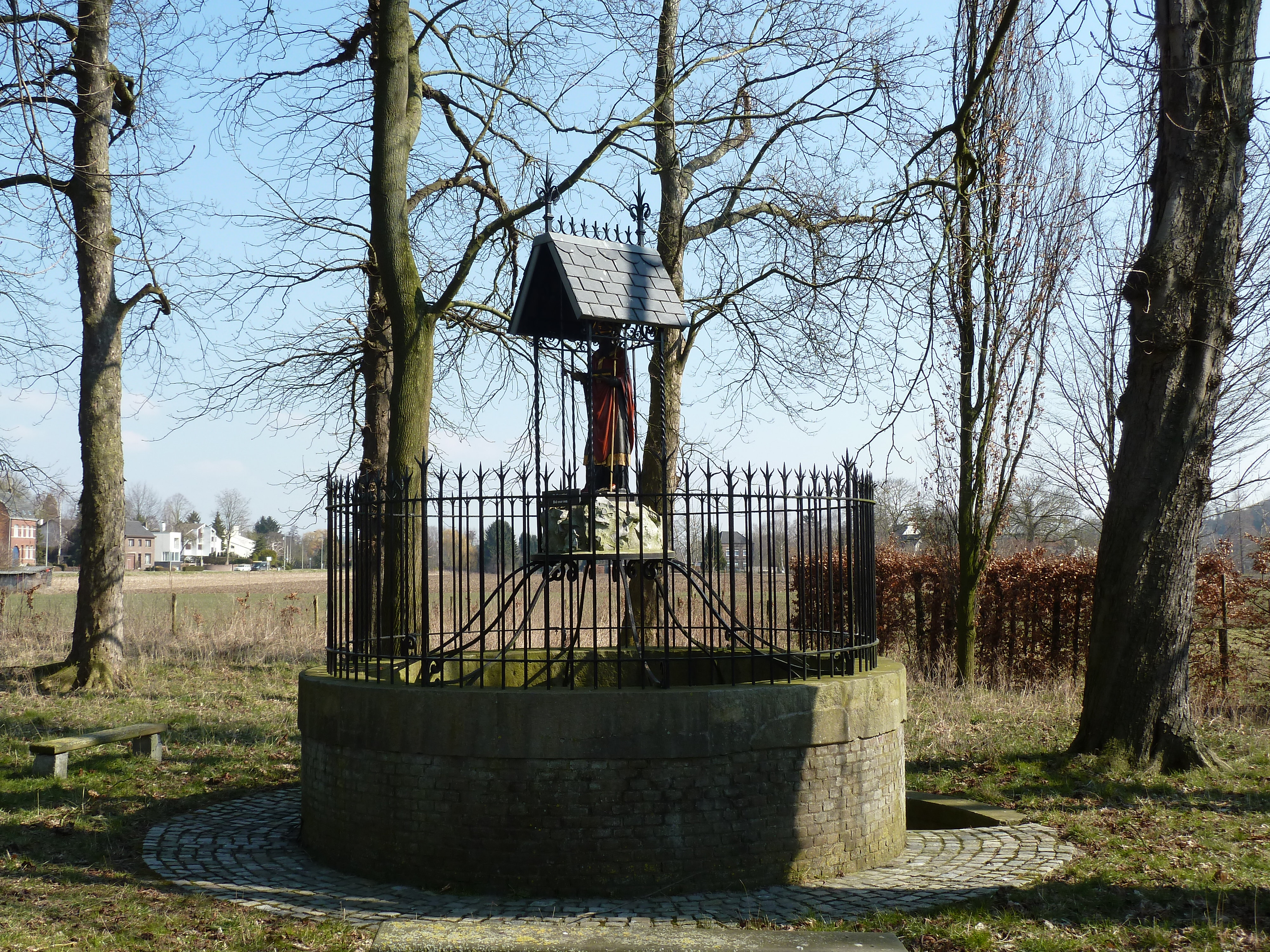 Sint-Servaasbron in het Jekerdal, Maastricht, Limburg, Nederland